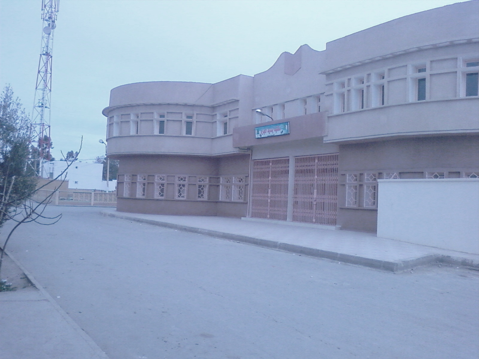 Siège de l'APC de Djezar